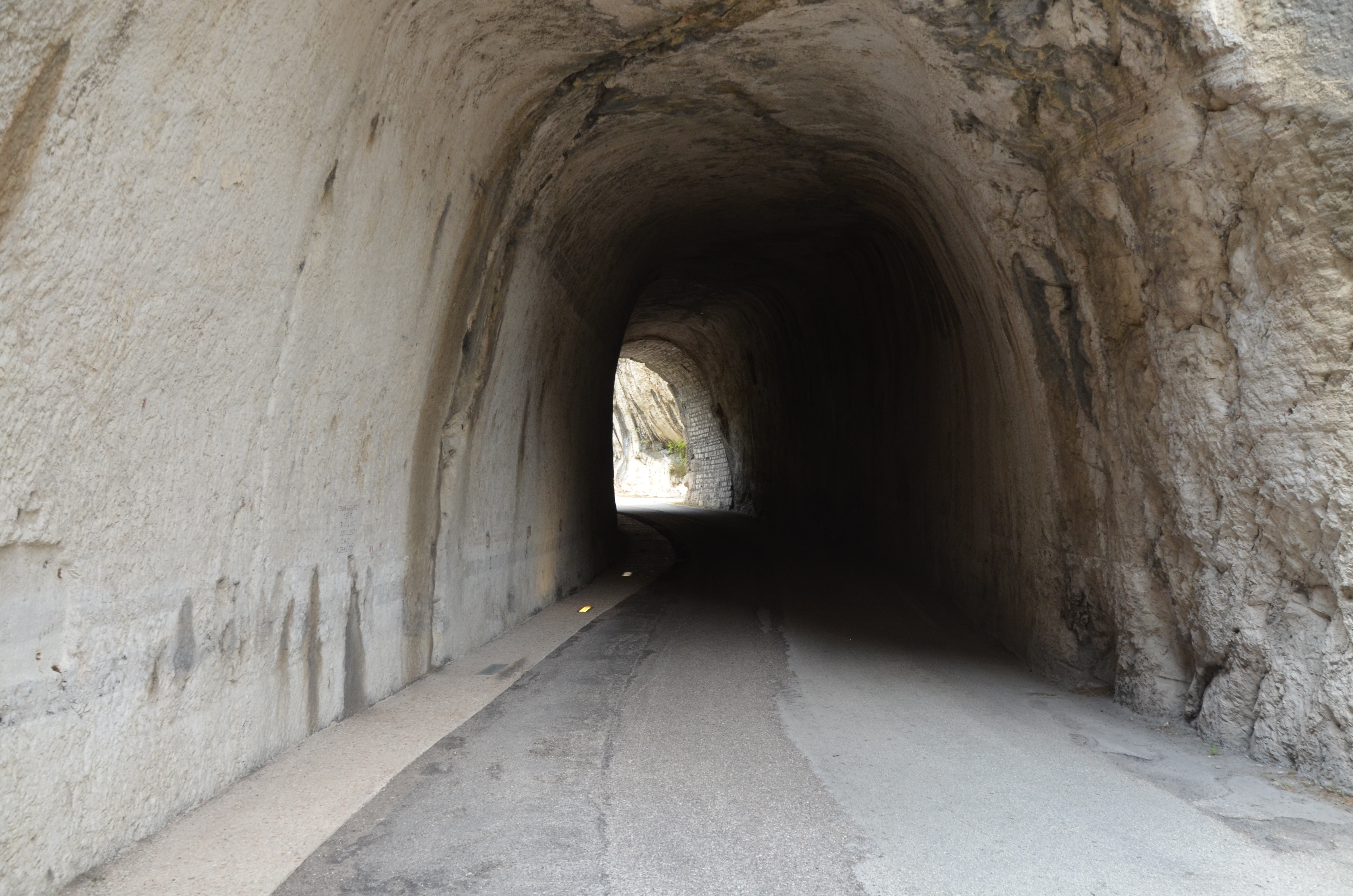 Via Flaminia, Italy